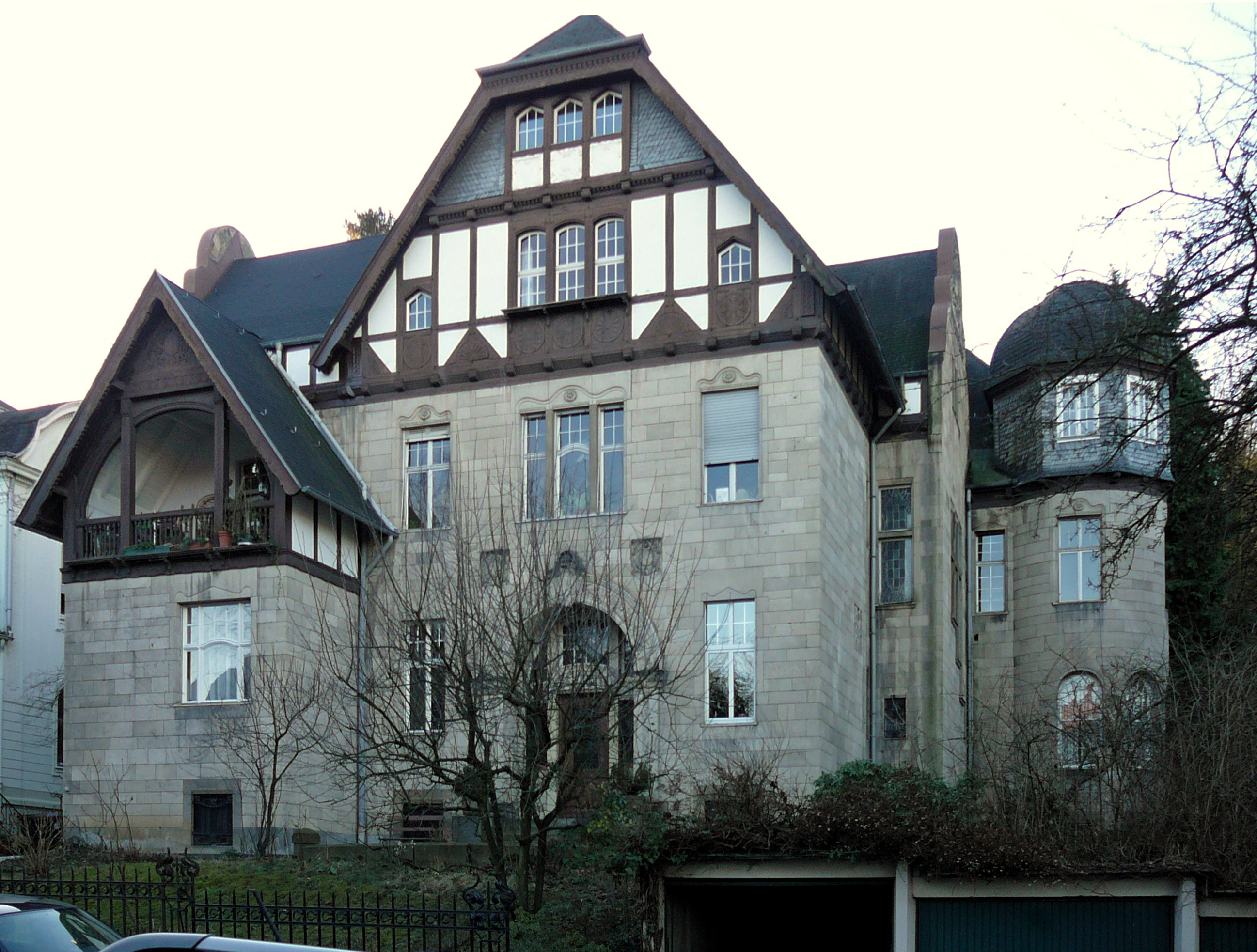 Villa im Briller Viertel, Moltkestr, Wuppertal